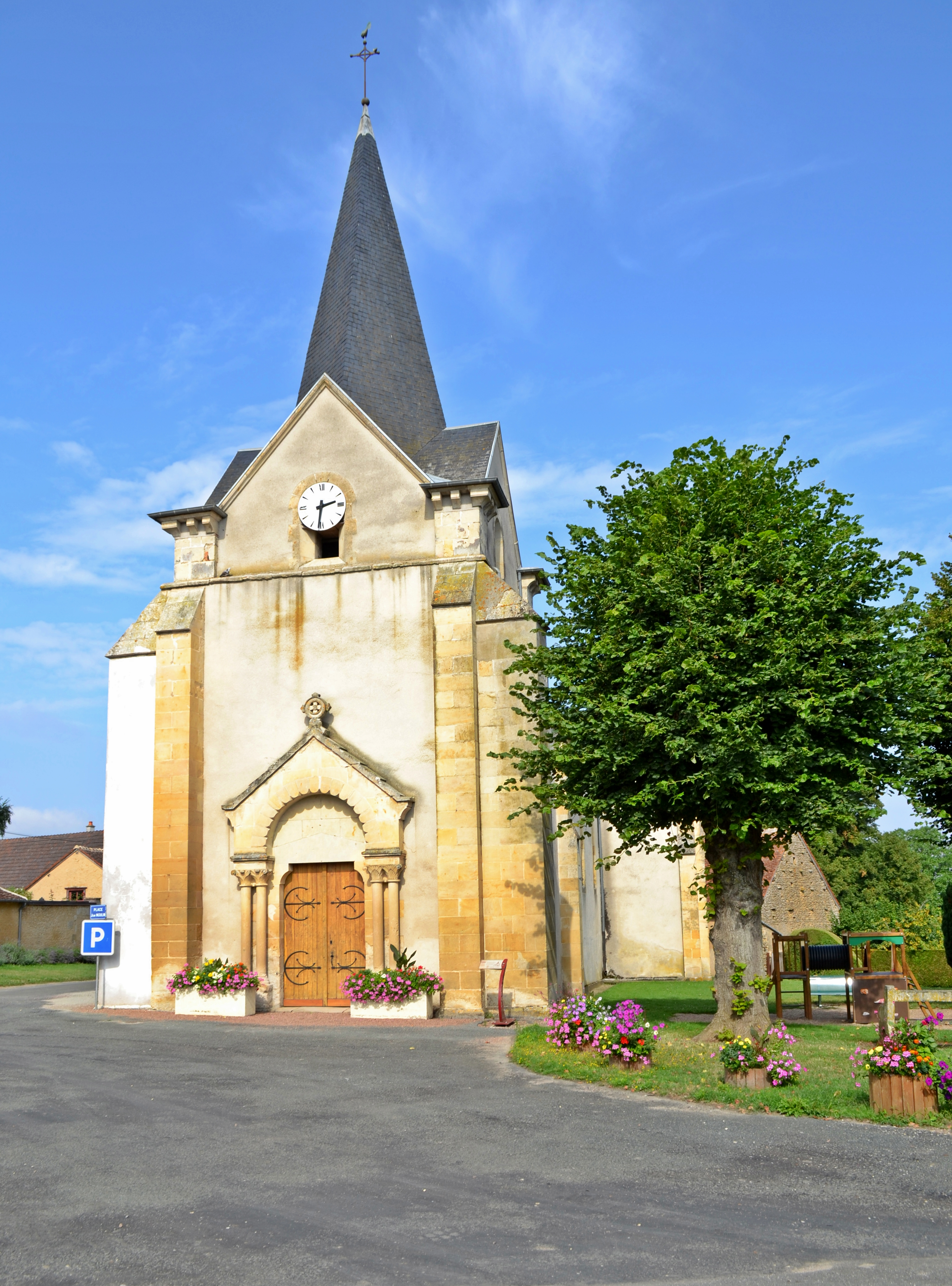 Eglise d'Ignol, département du Cher